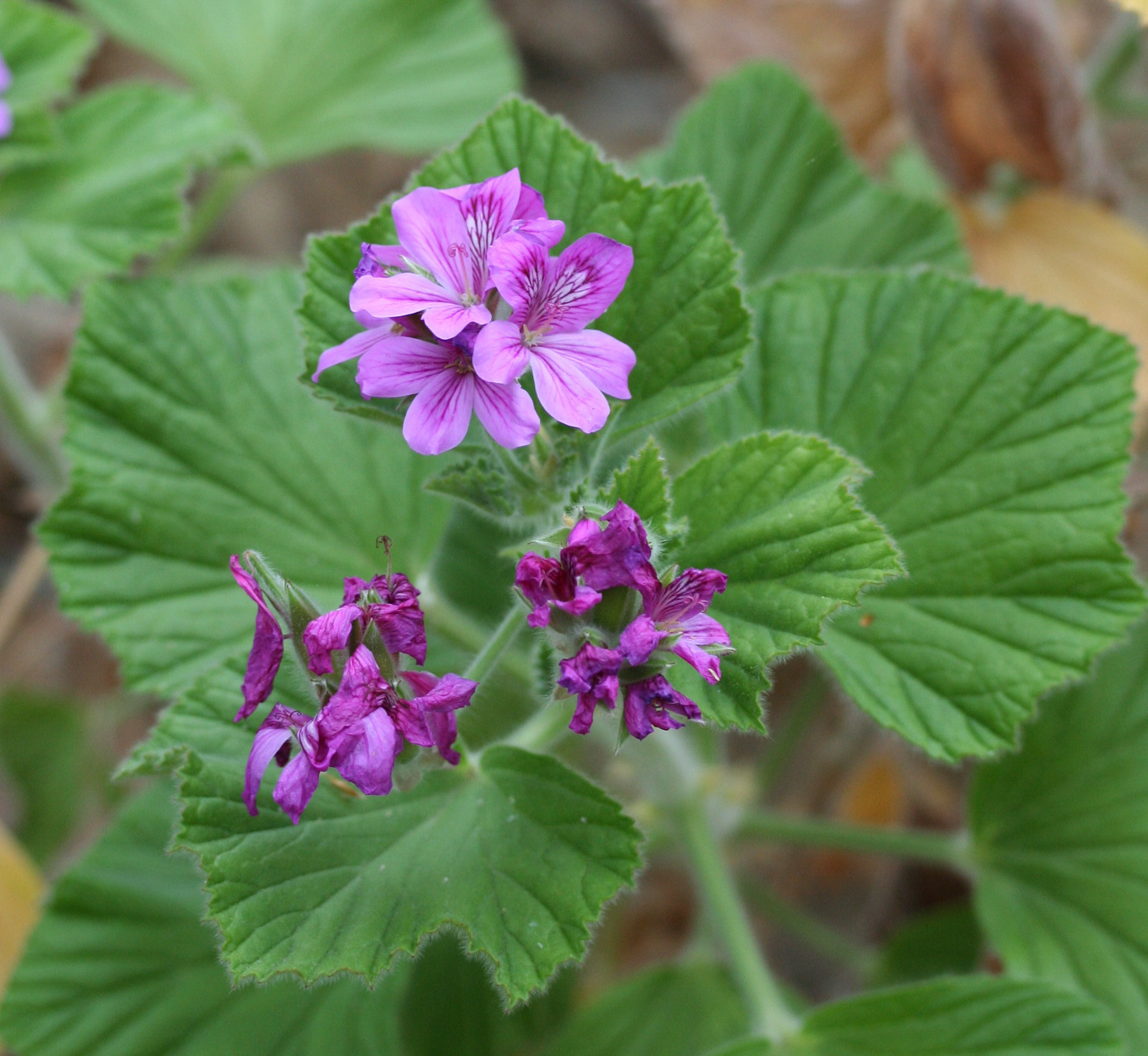 Pelargonium cucullatum im Botanischen Garten Dresden